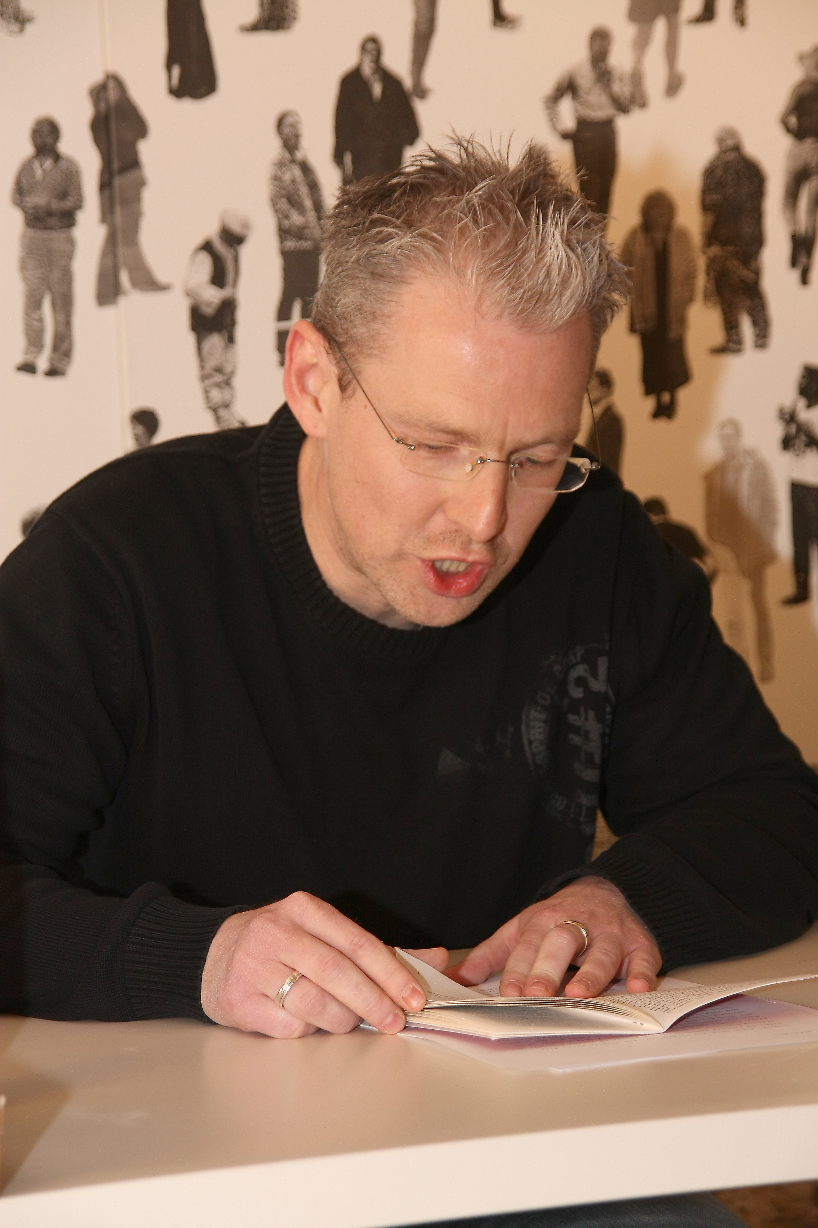 Während einer Lesung November 2010